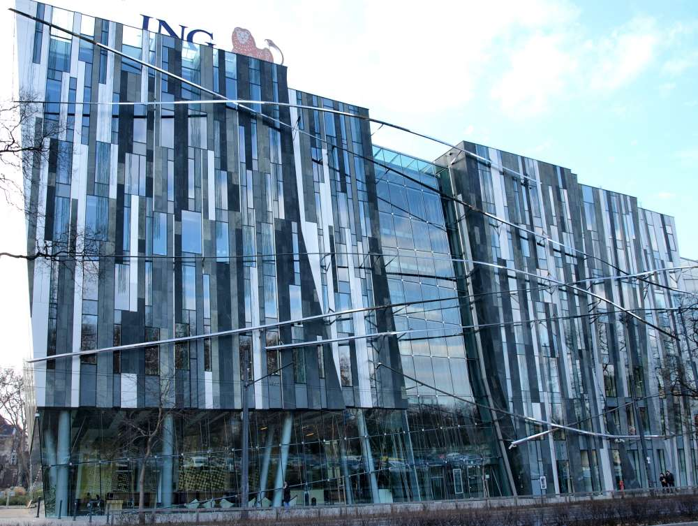 ING headquarters in Budapest (2004, designed by Erick van Egeraat)